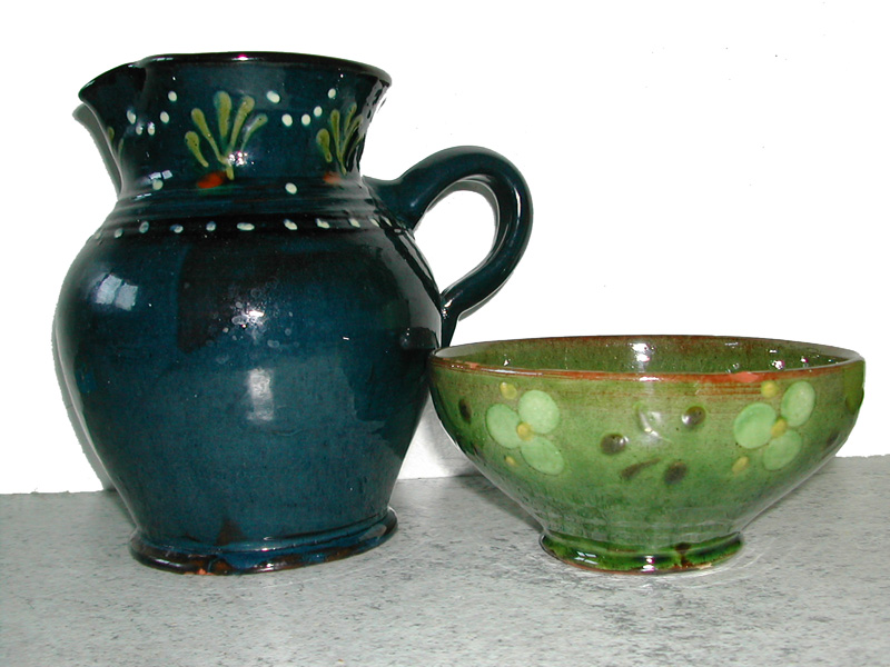 Poterie de Marnaz : une cruche et un bol